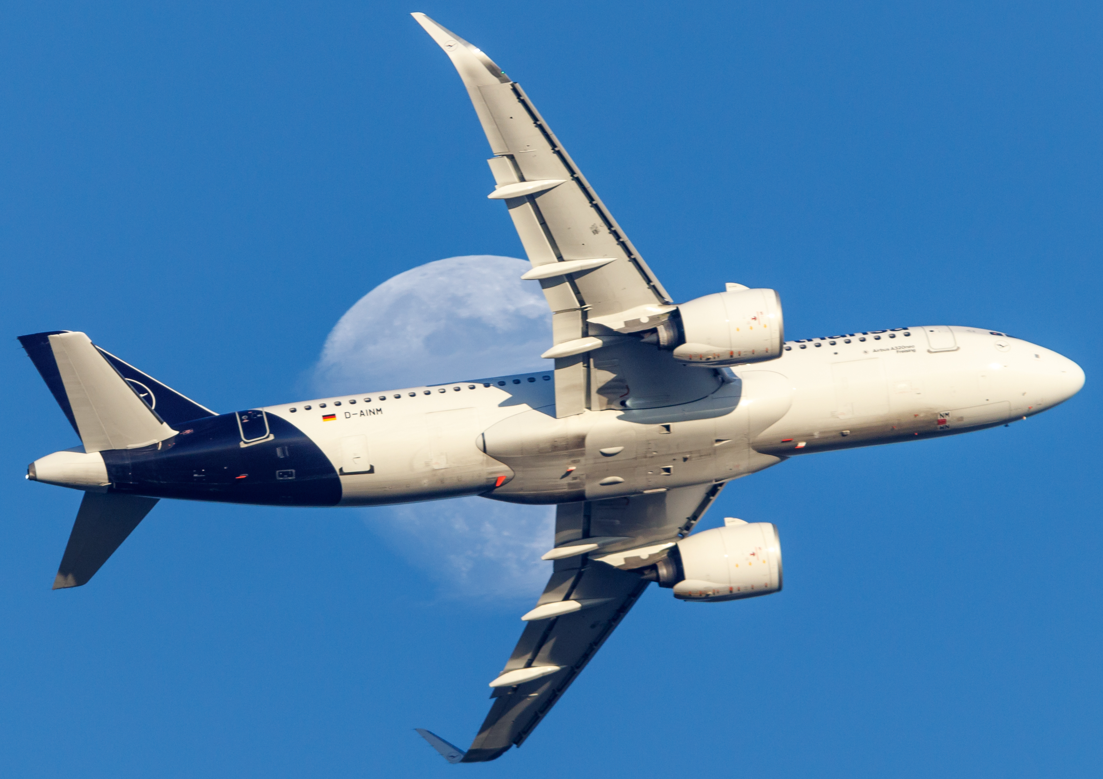 D-AINM Lufthansa A320neo FRA "Freising"